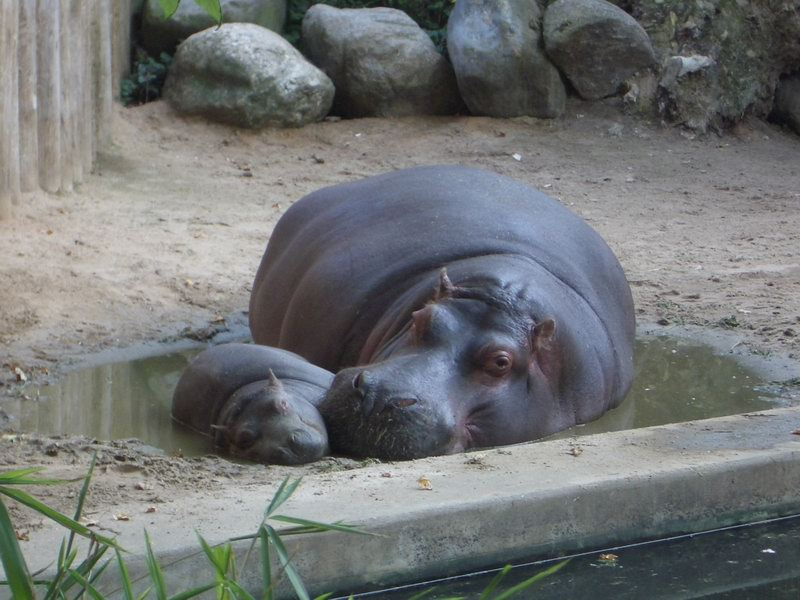 Nilpferde im Frankfurter Zoo